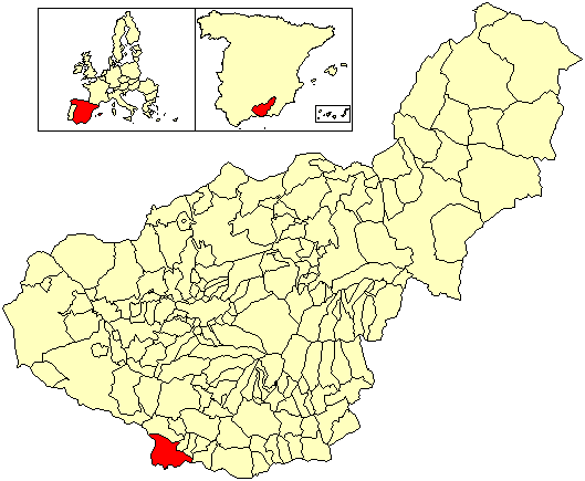 Situación del término municipal de Almuñécar respecto a la provincia de Granada, en España.